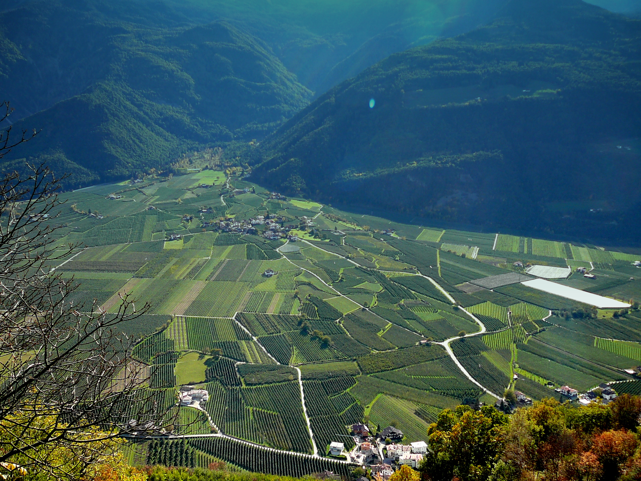 Schloss Juval